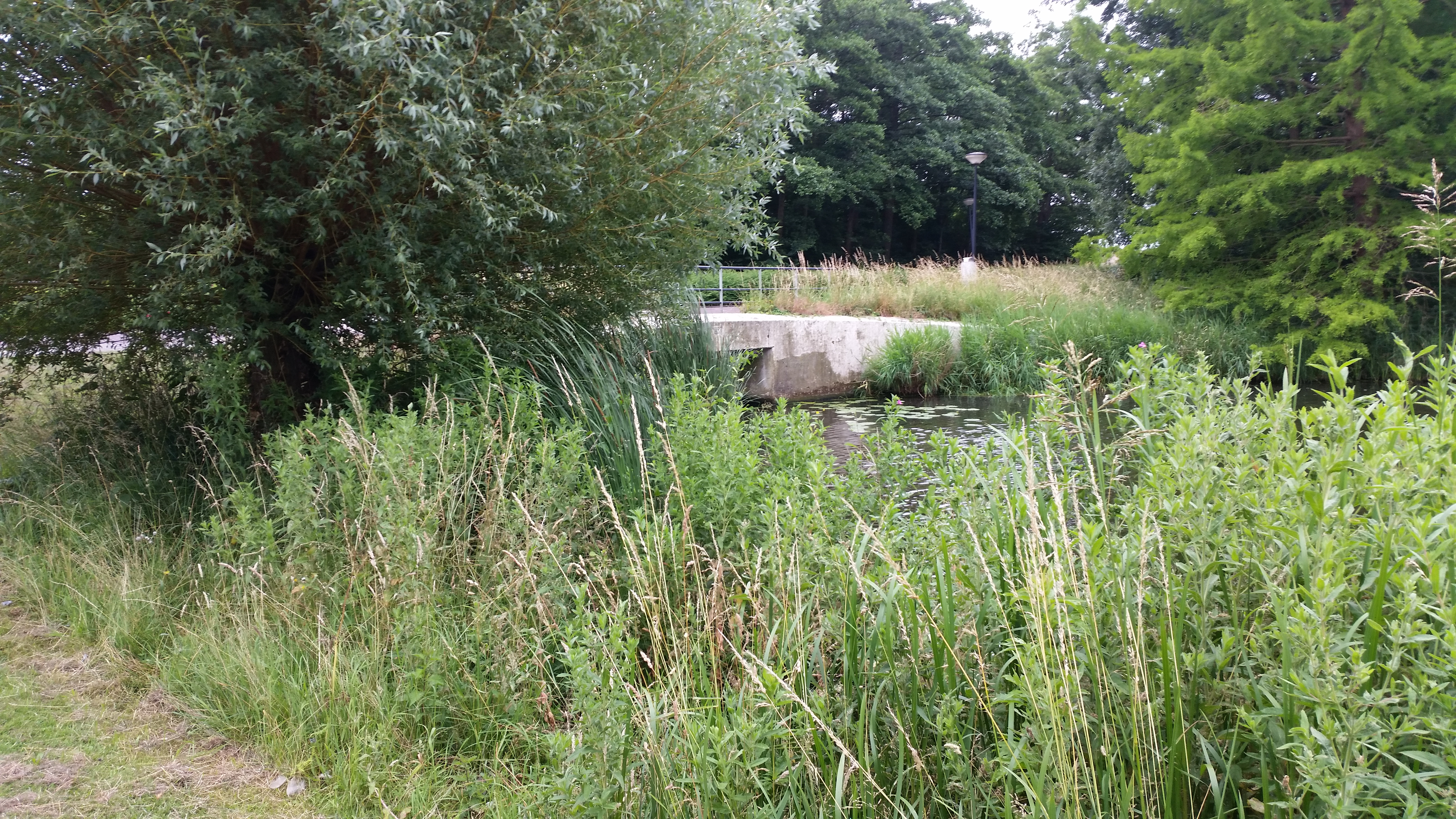 Overzicht van brug 769 in de P. Hans Frankfurthersingel, Amsterdam, Slotervaart